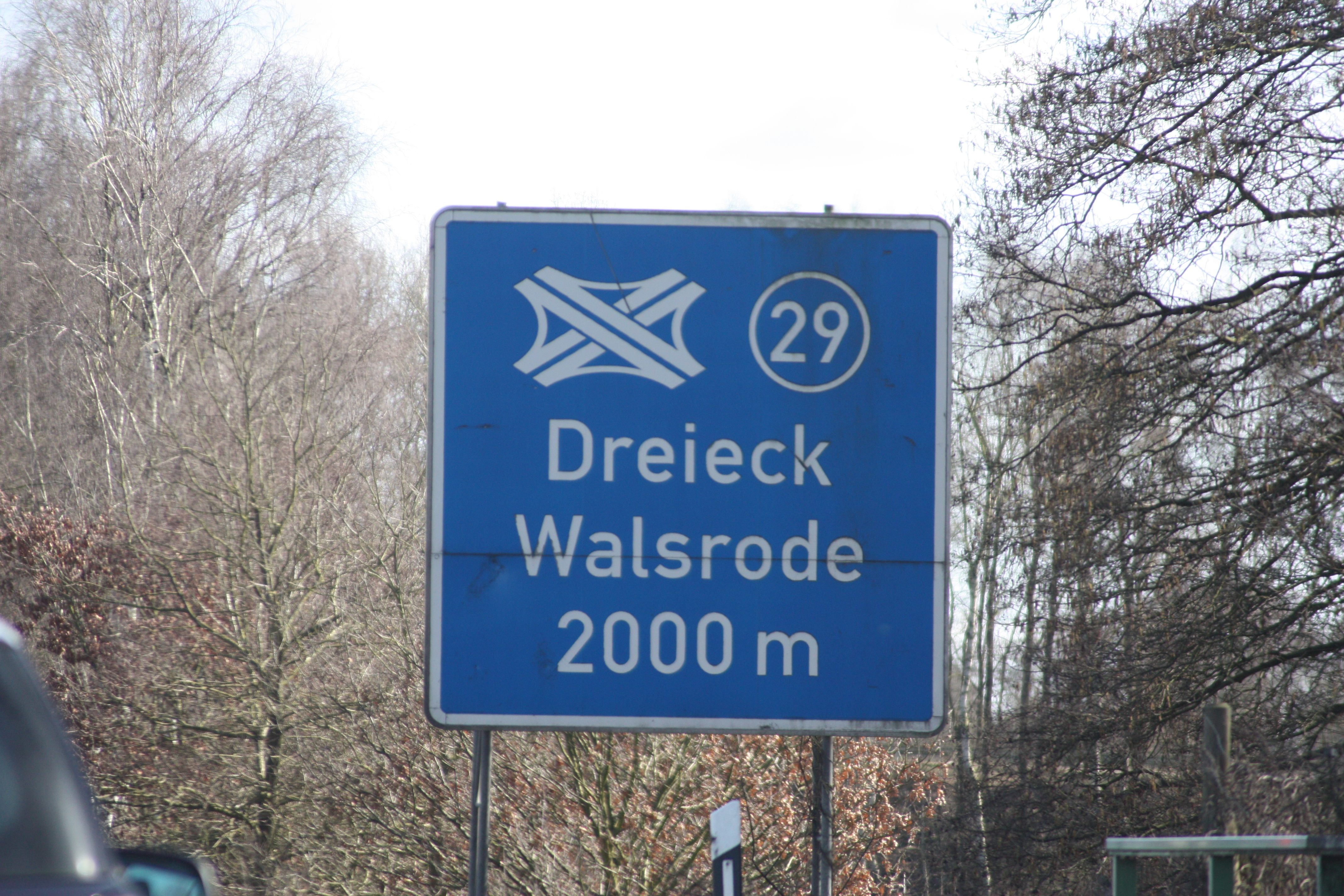 Bundesautobahn 7 / Bundesautobahn 27, Walsroder Dreieck